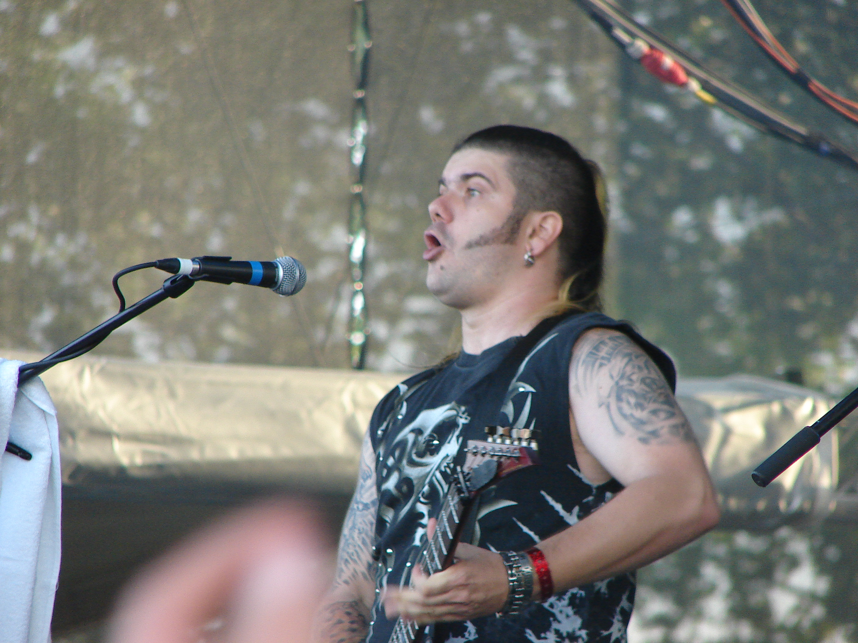 Jury, frontman skupiny Konflikt, na festivale Topfest (2009)